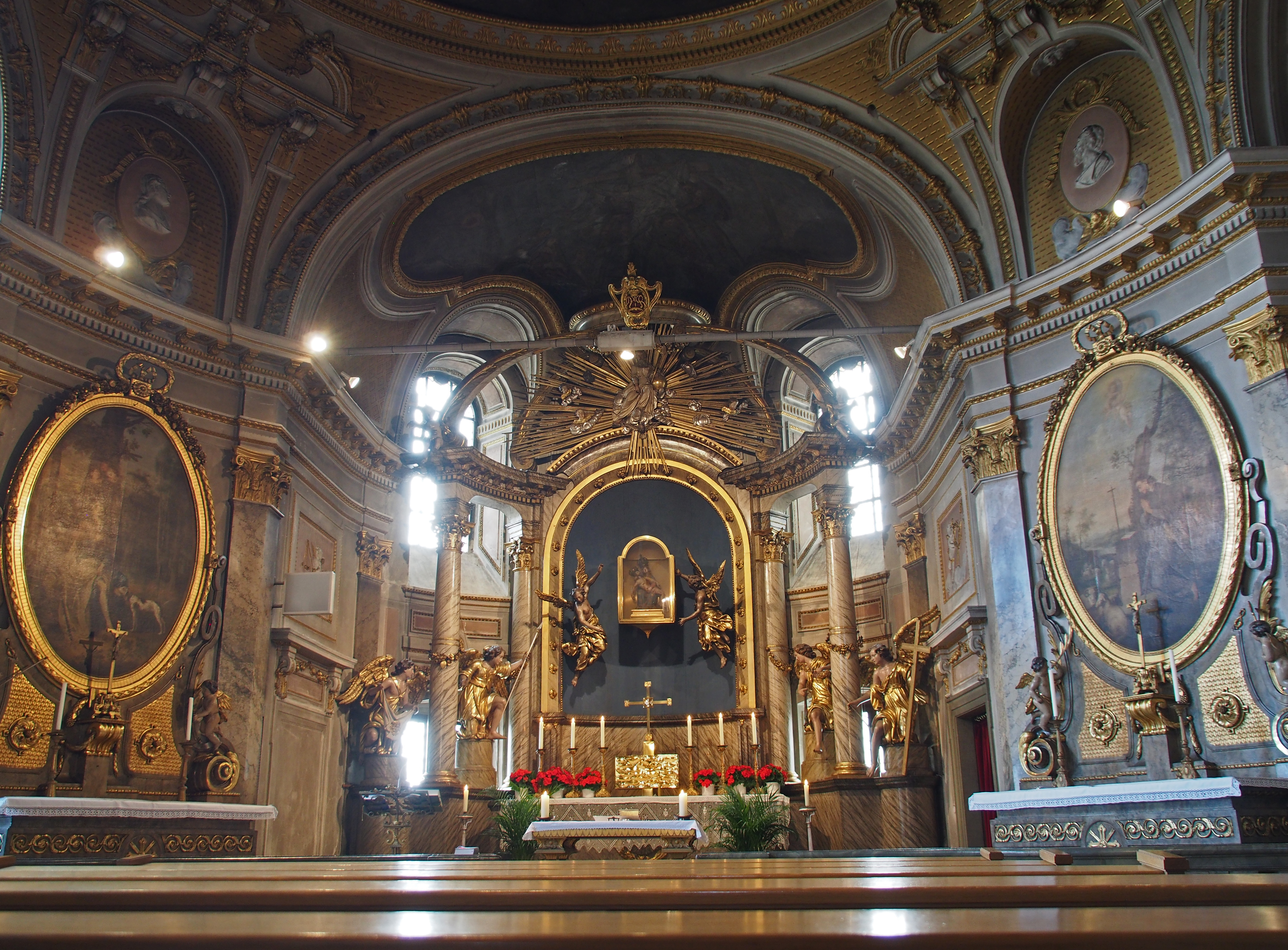 Gnadenkapelle im Käppele, Würzburg - (1778 erweitert, 1781 neu ausgestattet - Pieta von etwa 1640)